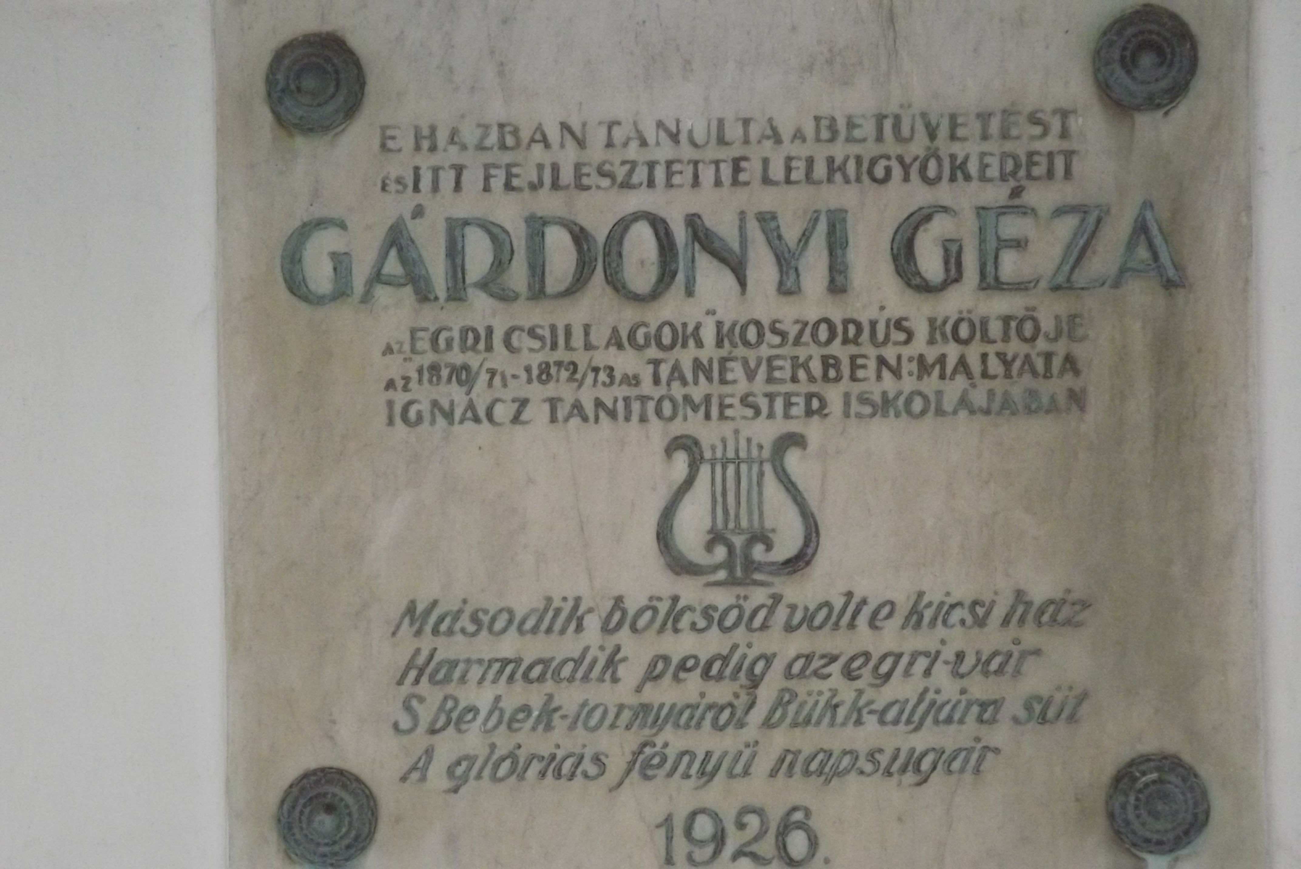 Sály, a Gárdonyi Géza-emlékház táblája